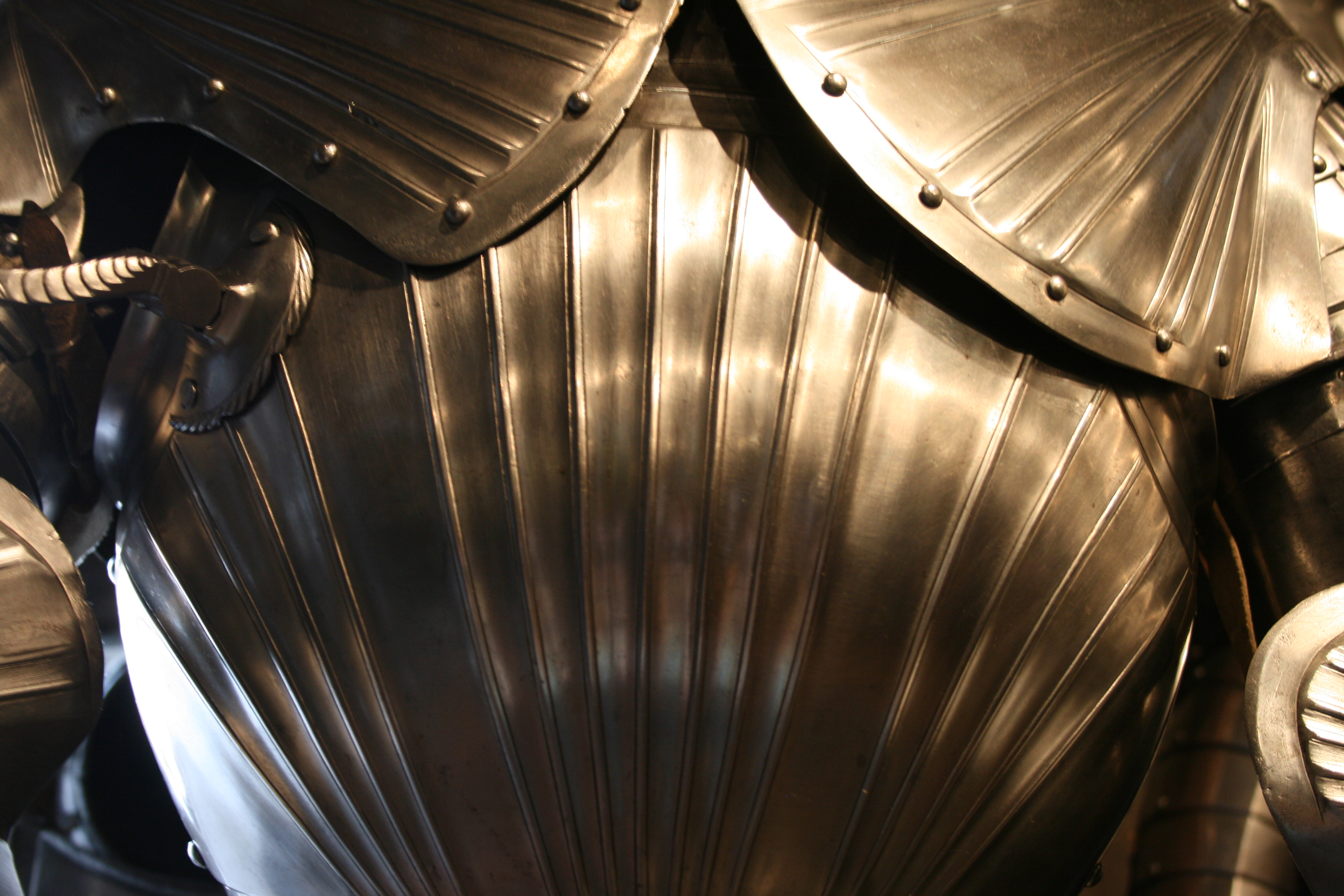 Riefelharnisch im Zeughaus Graz.